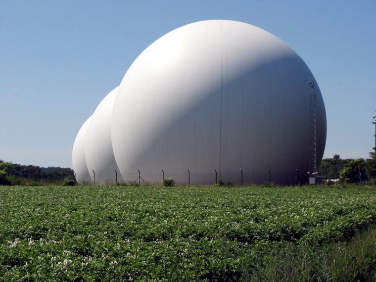 Radary w Vendsyssel w północnej Danii Radary znajdują się wewnątrz pompowanej osłony, aby uchronić je przed wpływem czynników zewnętrznych (wiatru, deszczu). Osłony te są jednak na tyle cienkie, że są praktycznie przezroczyste dla promieni mikrofalowych, których używają radary.